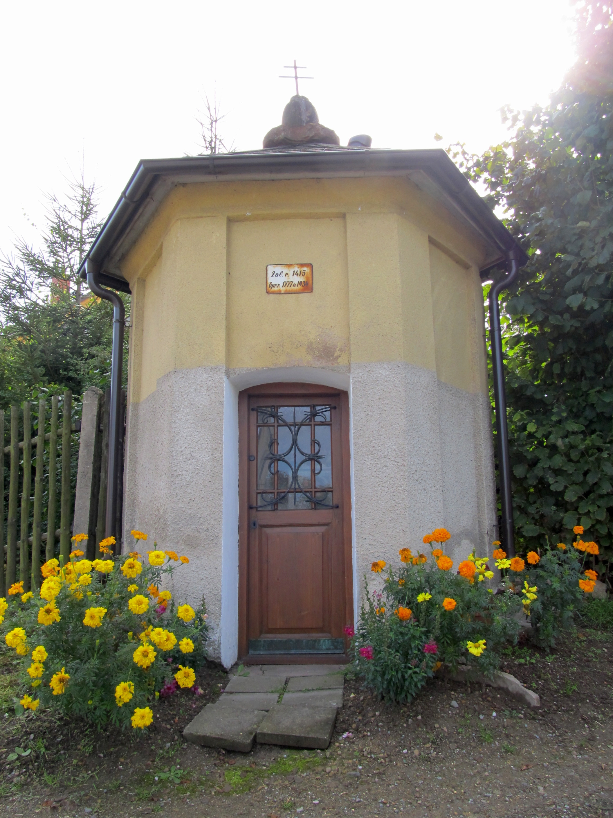 Kaple P. Marie (Kramolna), u hlavní silnice, proti čp. 63, Kramolna